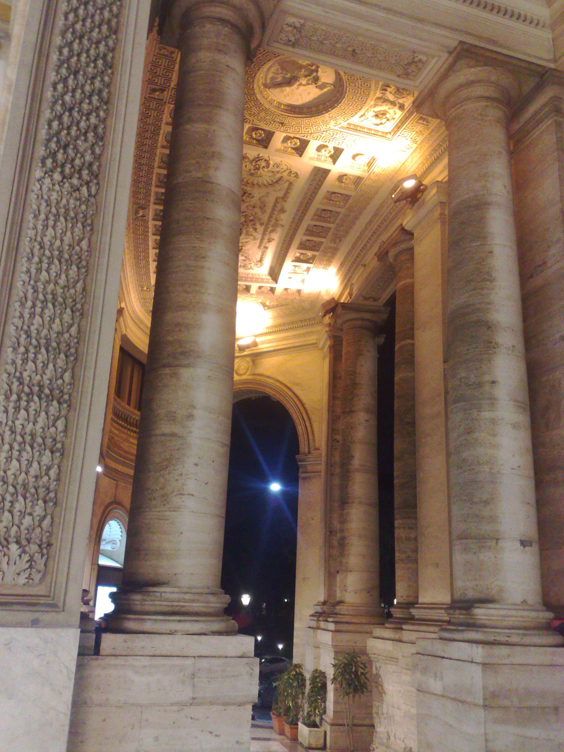 Particolare del soffitto posto sotto l'ingresso esterno della Galleria Umberto I, di fronte al Teatro San Carlo.